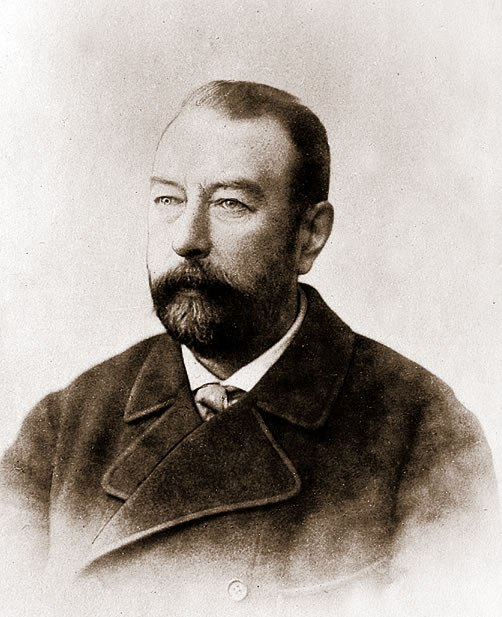 Павел Григорьевич Шелапутин (1848–1914) — промышленник, действительный статский советник, потомственный дворянин, общественный деятель, выдающийся благотворитель.